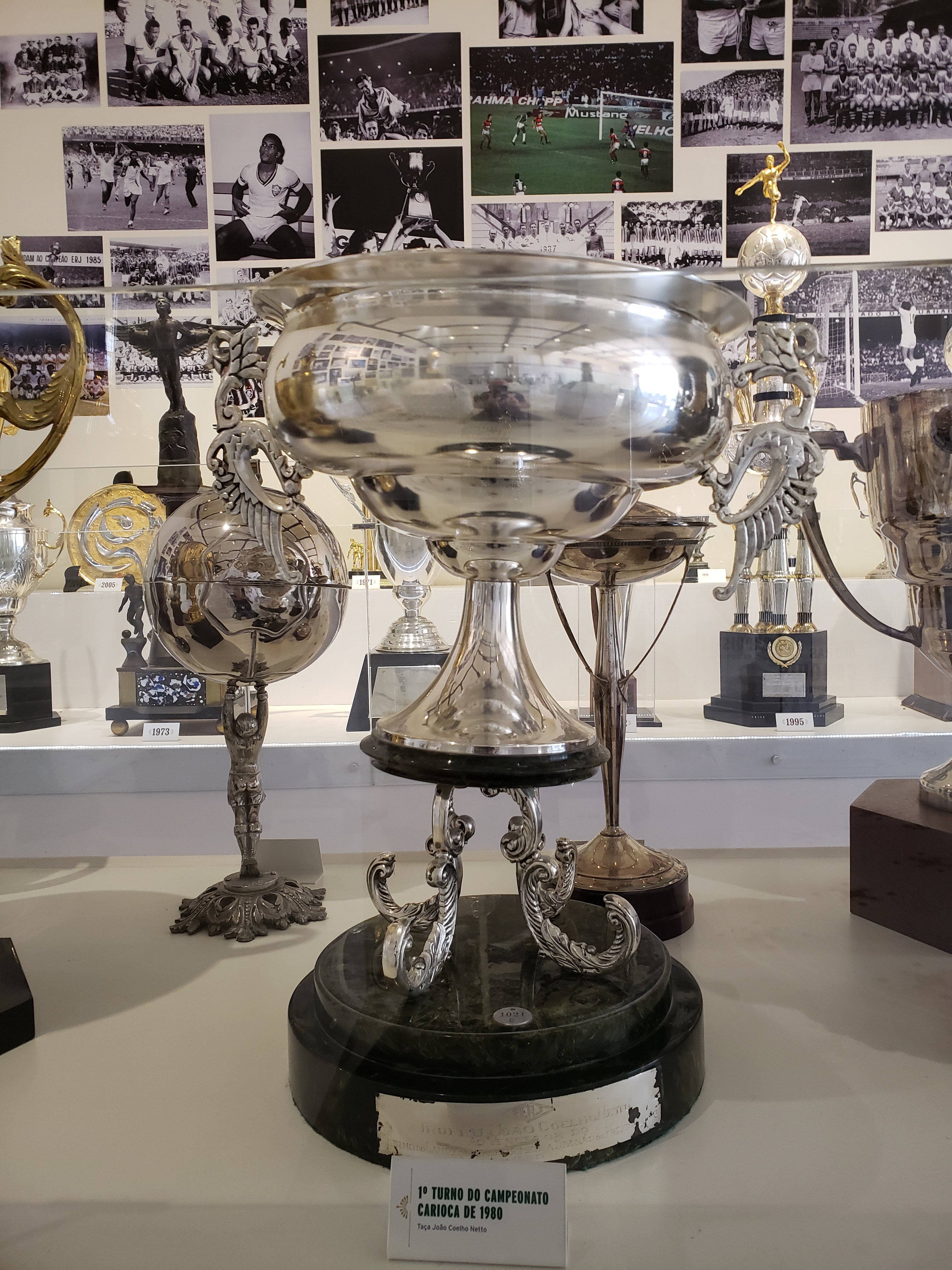 Taça do Primeiro Turno do Campeonato Carioca de Futebol de 1980, conquistado pelo Fluminense Football Club.